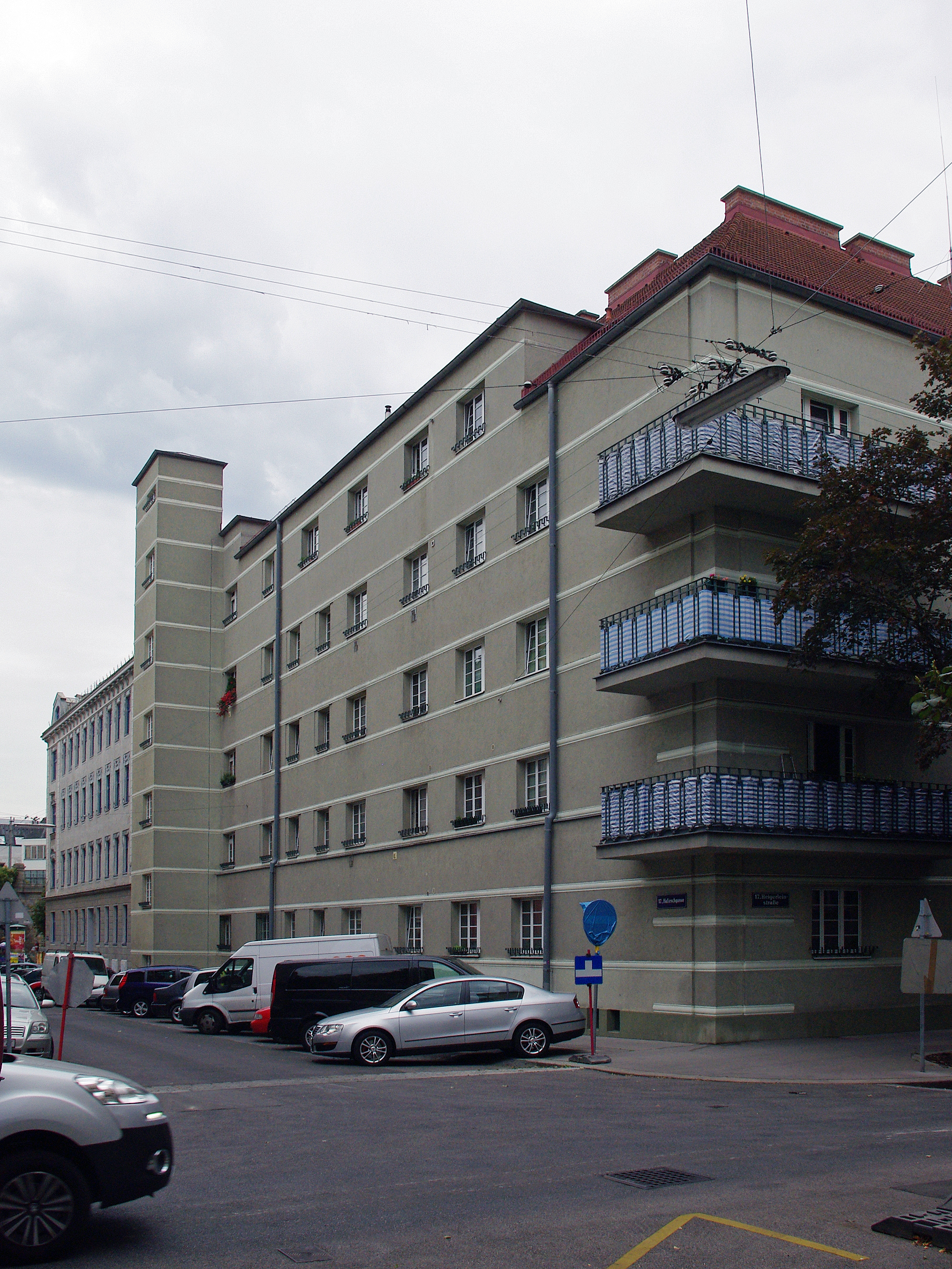 Sozialer Wohnbau, Holy-Hof